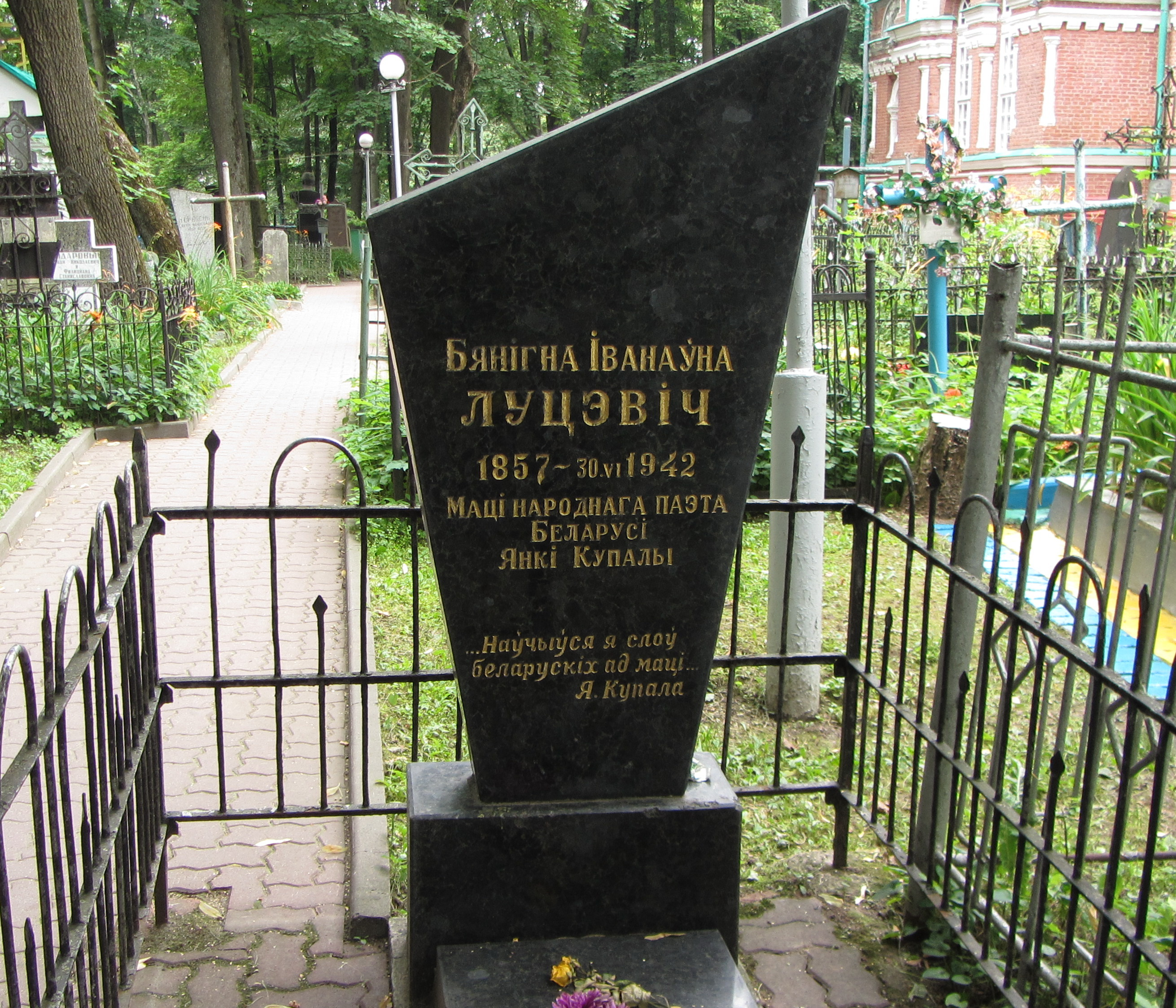 Беларуская (тарашкевіца): Помнік Банігне Луцэвіч. Вайсковыя могілкі, Менск